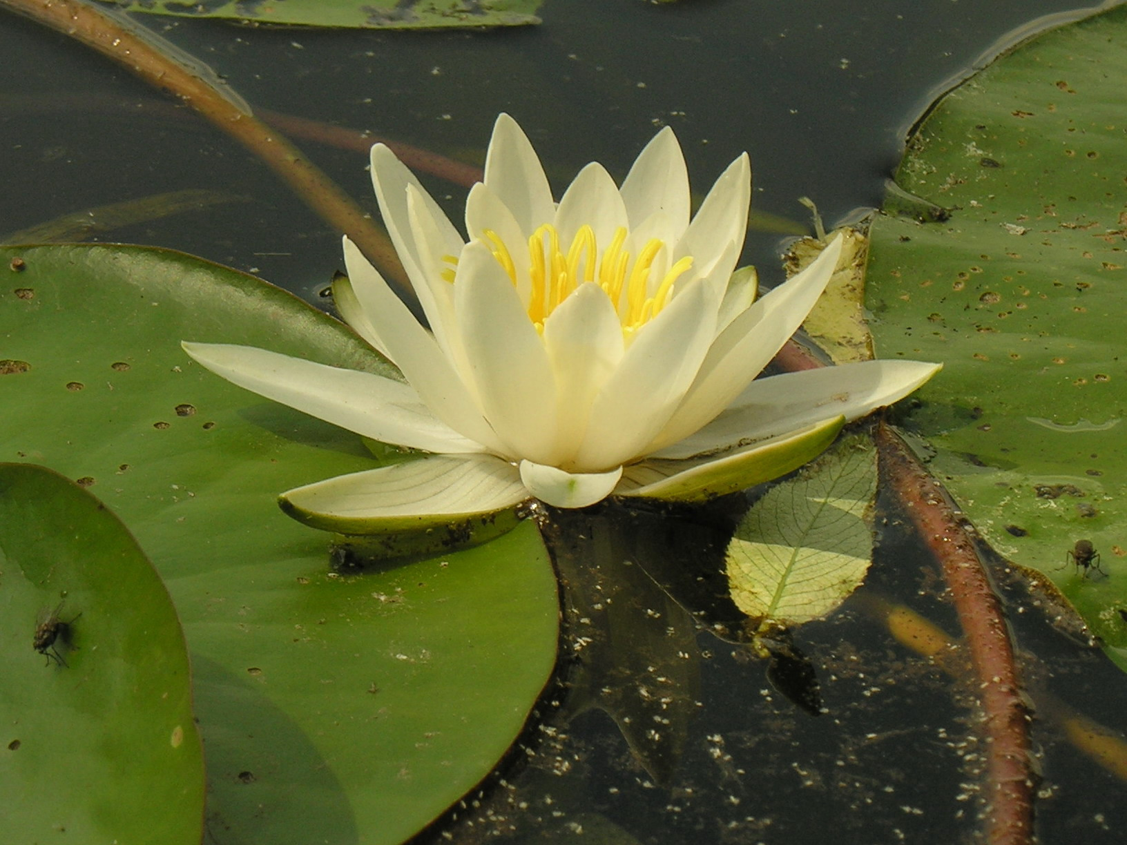 Paprastoji vandens lelija (Nymphaea alba). Šeima. Lūgniniai (Nymphaeaceae). Foto: Algirdas, 2006 m. liepos 6 d., Lietuva